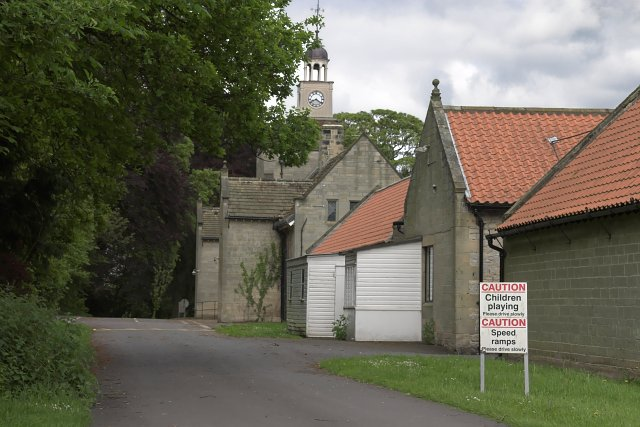 Welburn Hall School